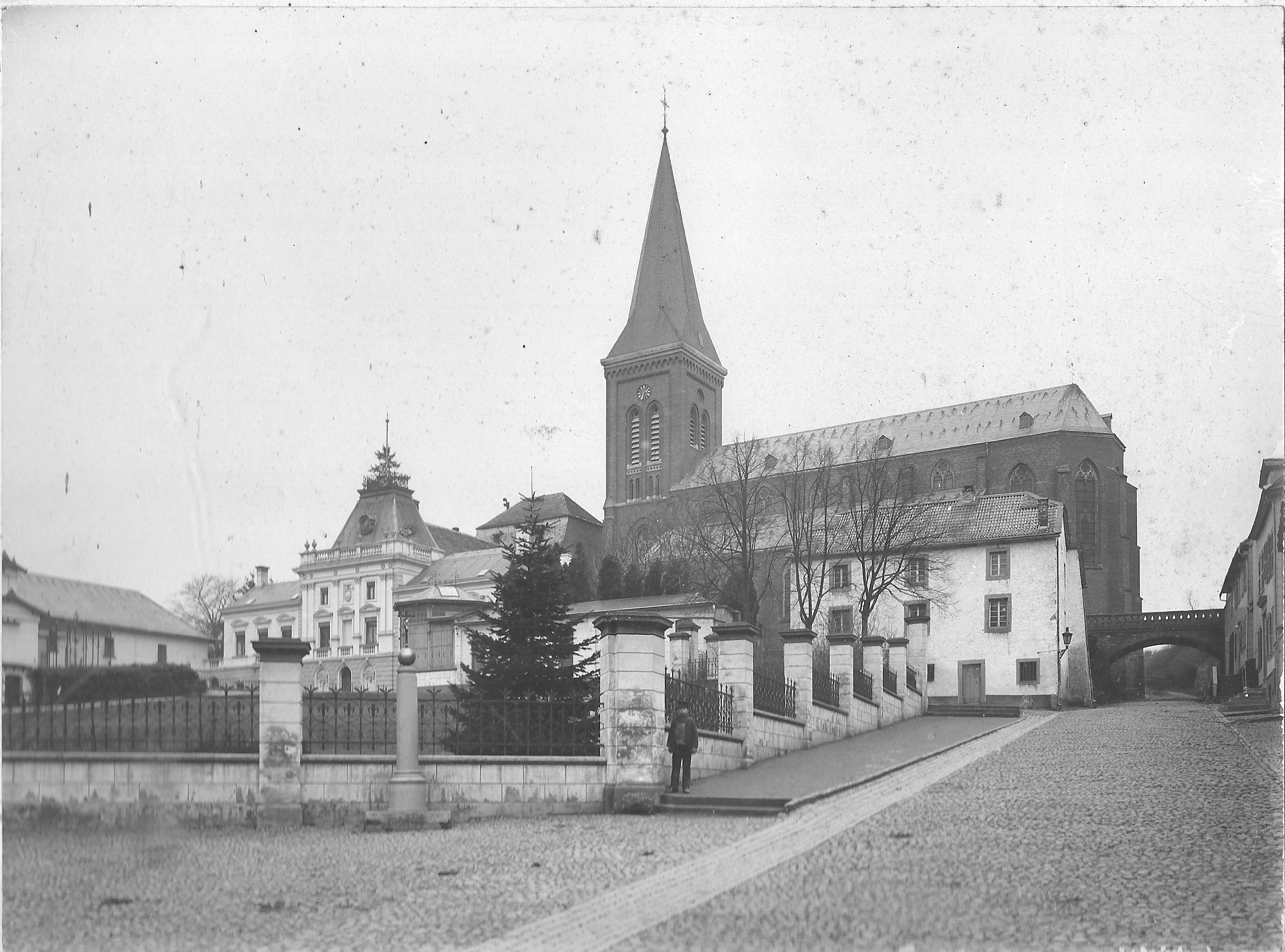 Blick von der Kölner Strasse auf den Kirchberg mit Kirche und Burg (um 1900)